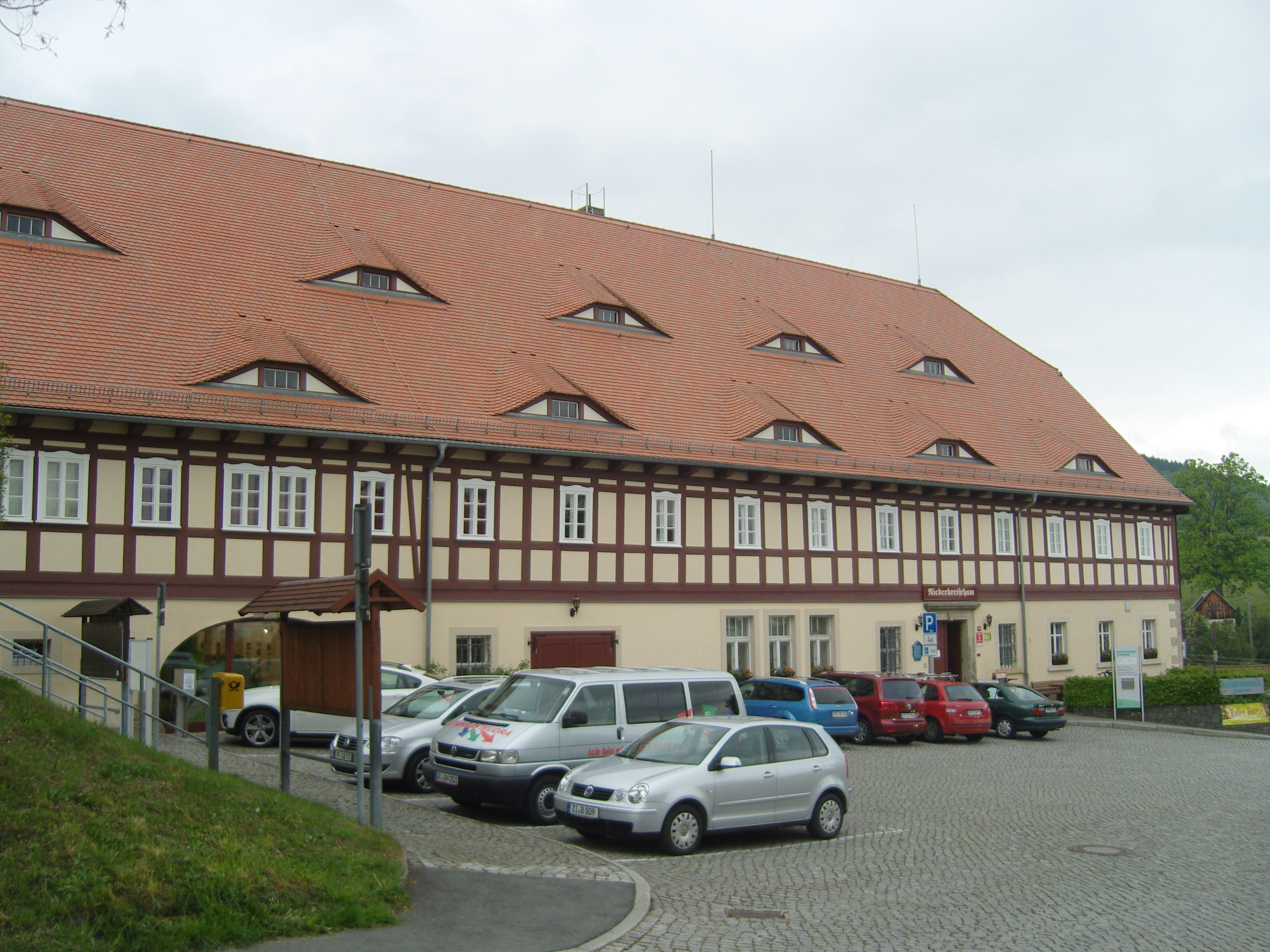 Denkmalgeschützter Niederkretscham in der Hauptstraße 28 in Waltersdorf; Gemeinde Großschönau